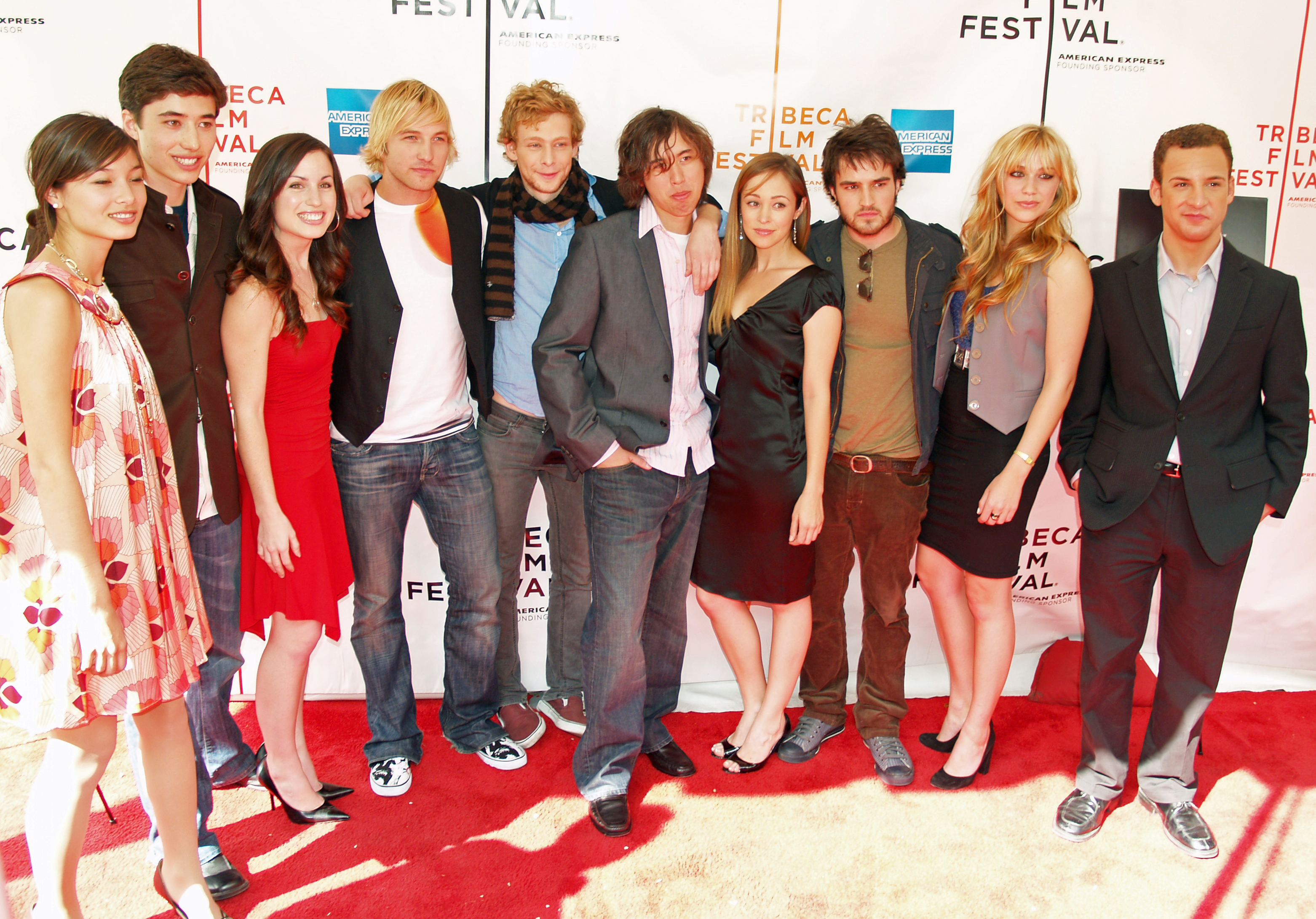 Palo Alto film cast